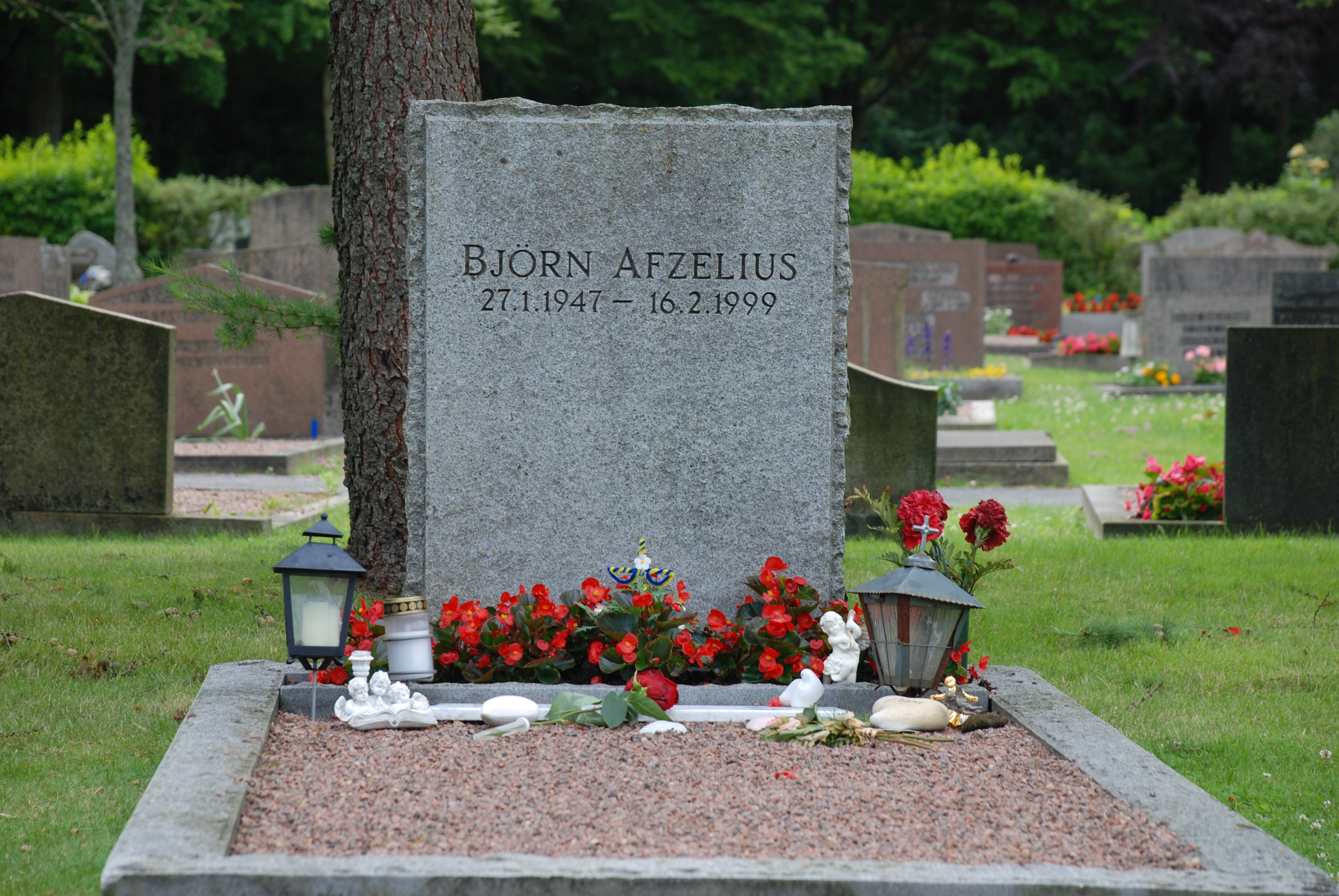 Musikern mm Björn Afzelius grav på Västra kyrkogården i Göteborg. Grav nr K014, G00246.